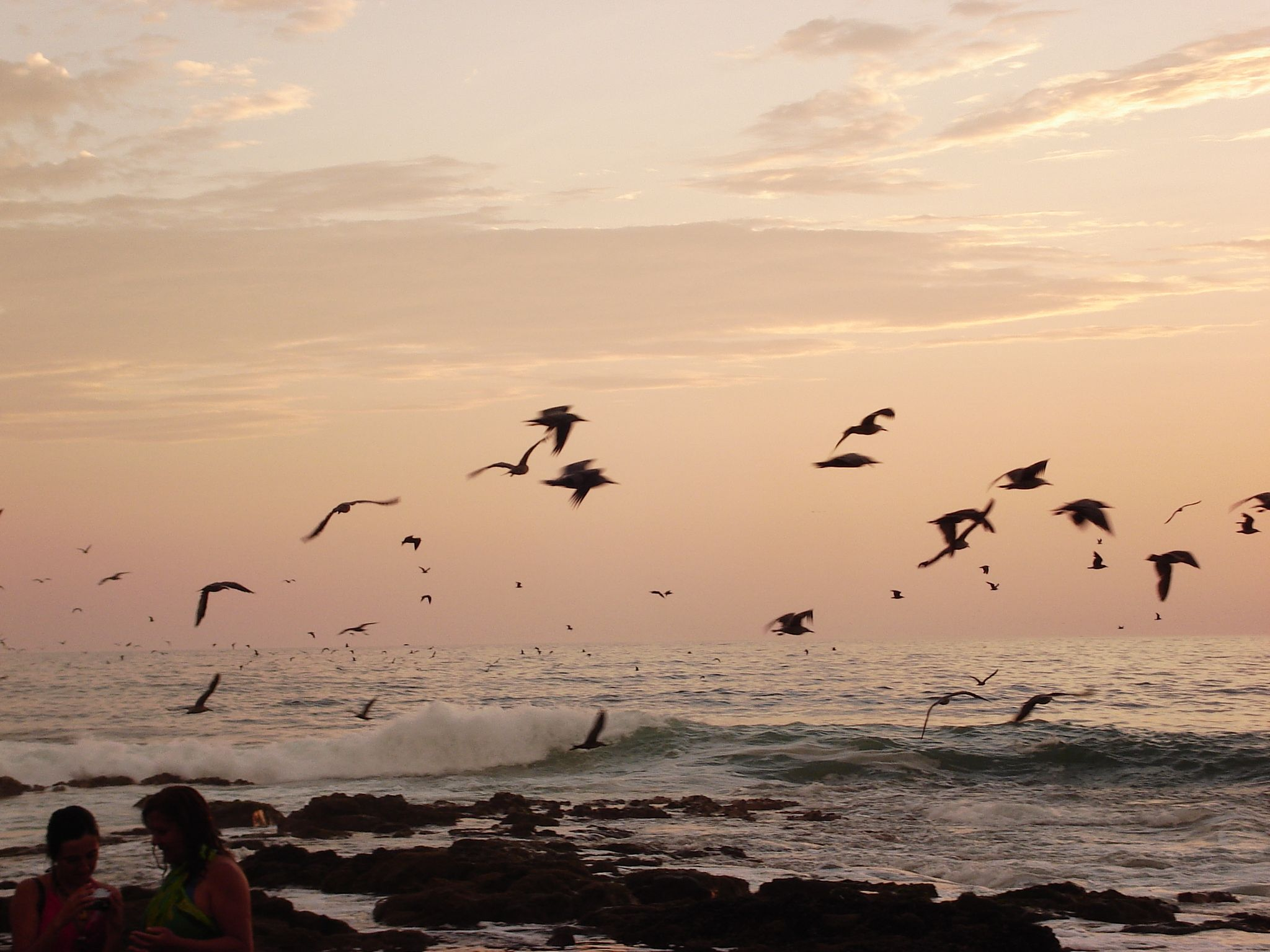 Foto tirada por mim, em Arica.